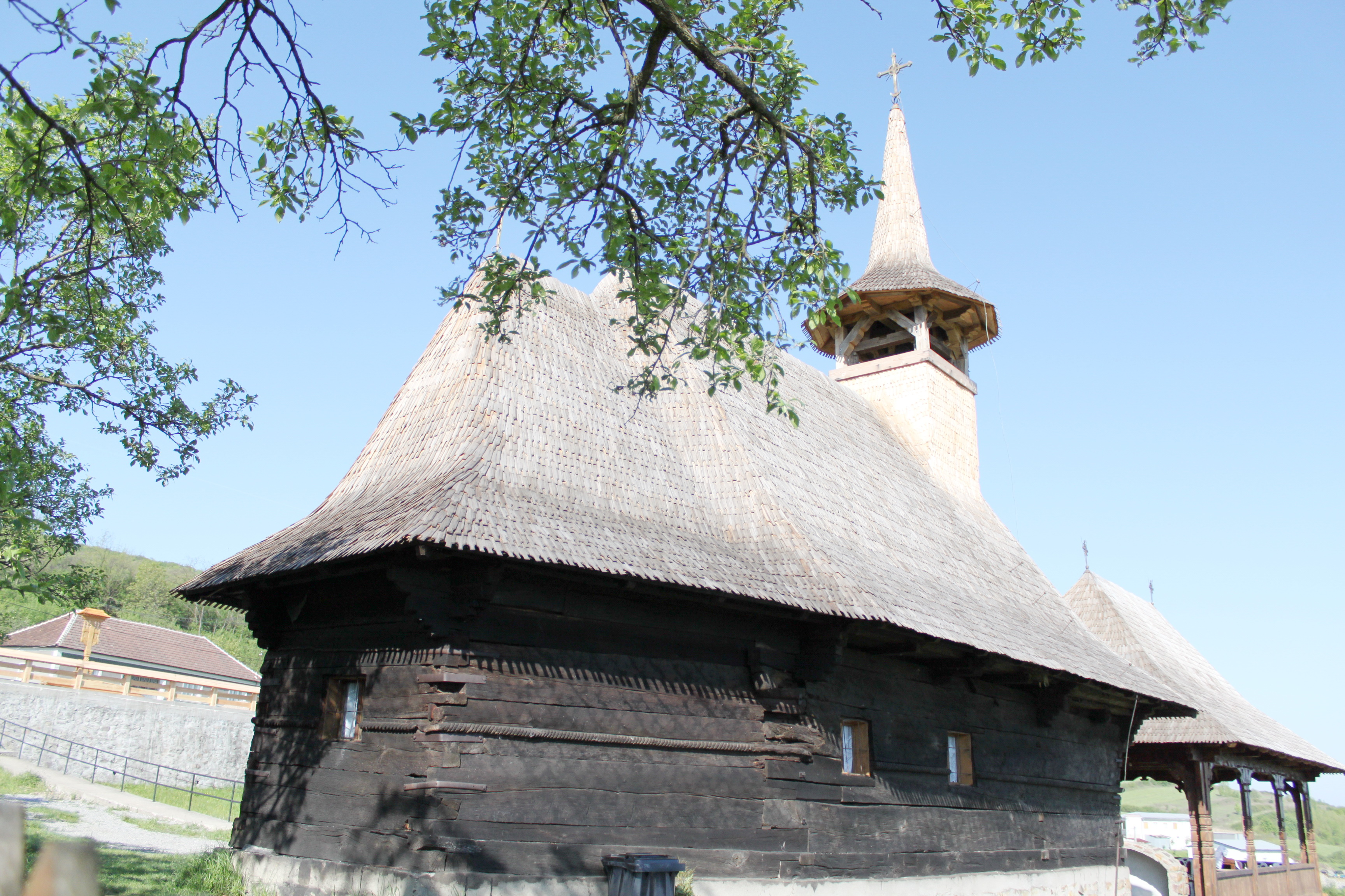 Biserica de lemn din Brăteşti, judeţul Bihor.